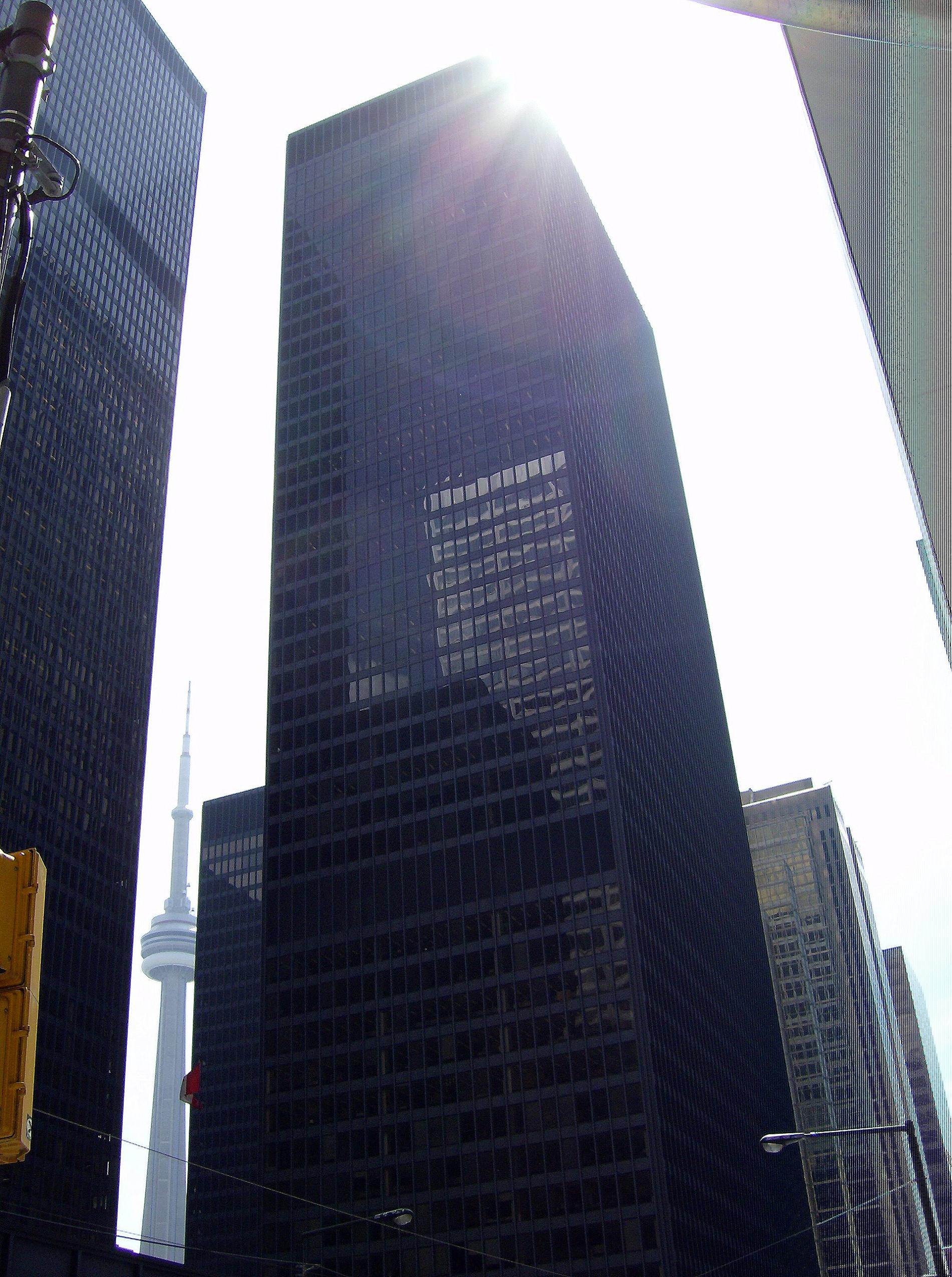 Toronto-Dominion Centre in Toronto, Canada.